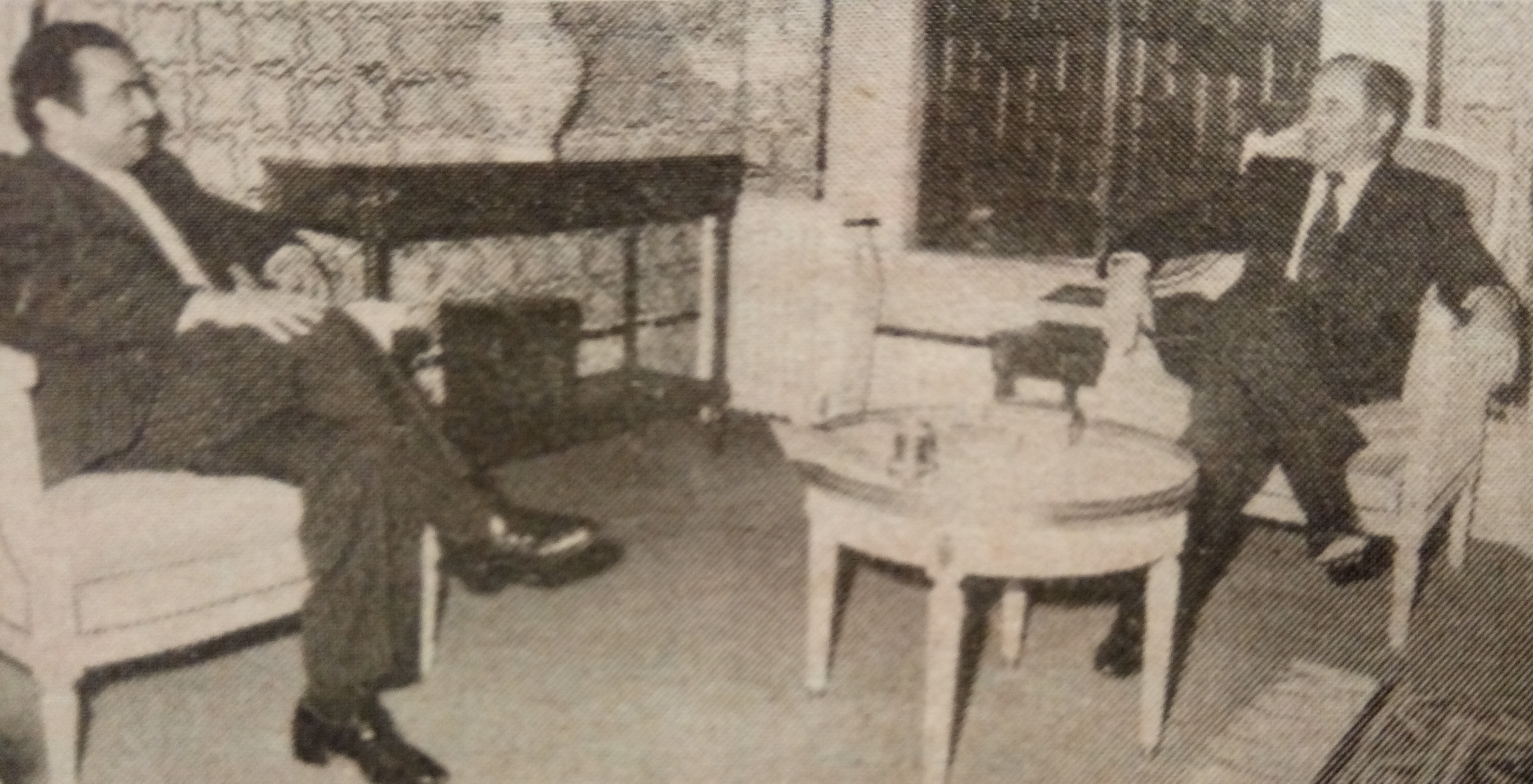 Assabah 1980